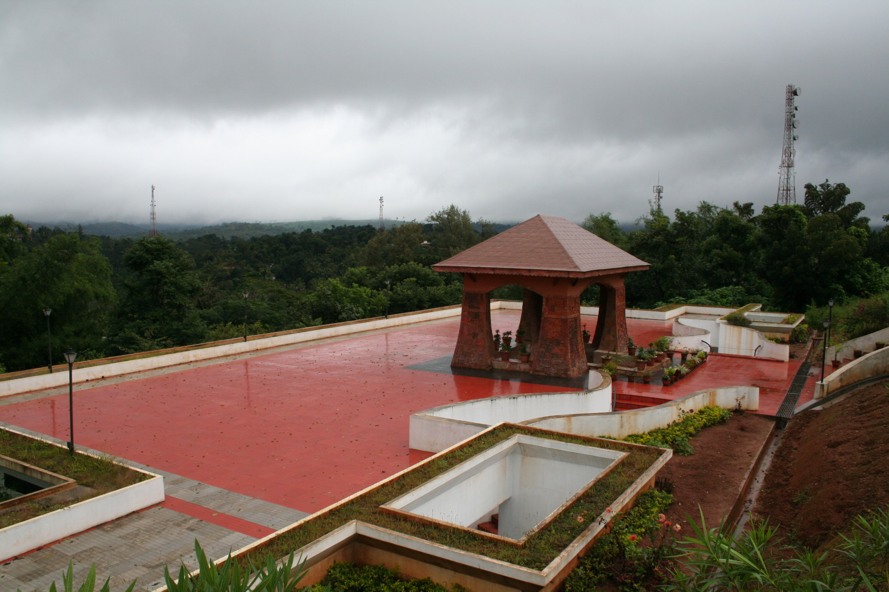 Pazhassi tomb - Wayanad